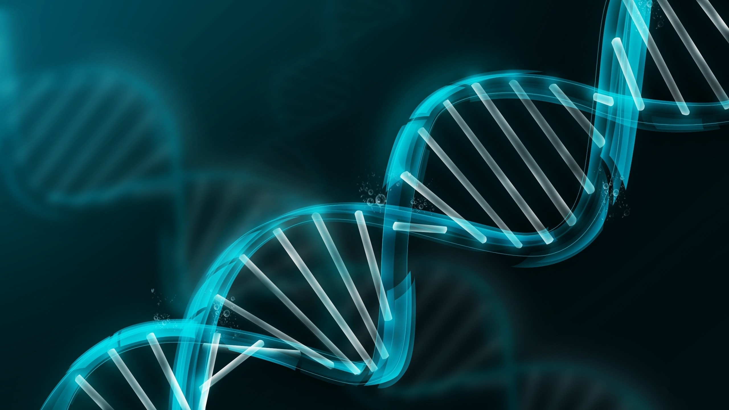 Doble hélice con sus nucleótidos